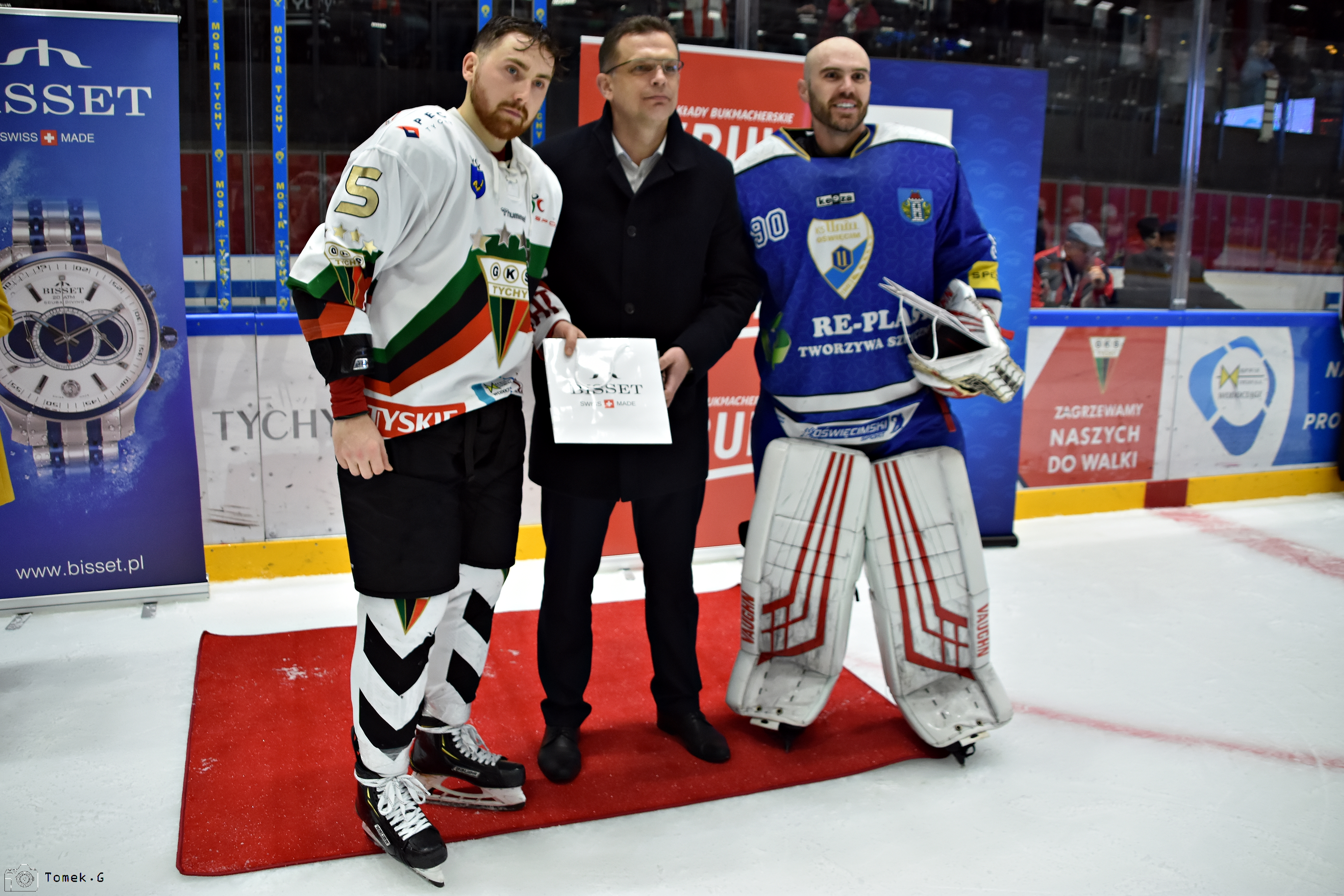 Puchar Polski w Hokeju na Lodzie 2019/2020